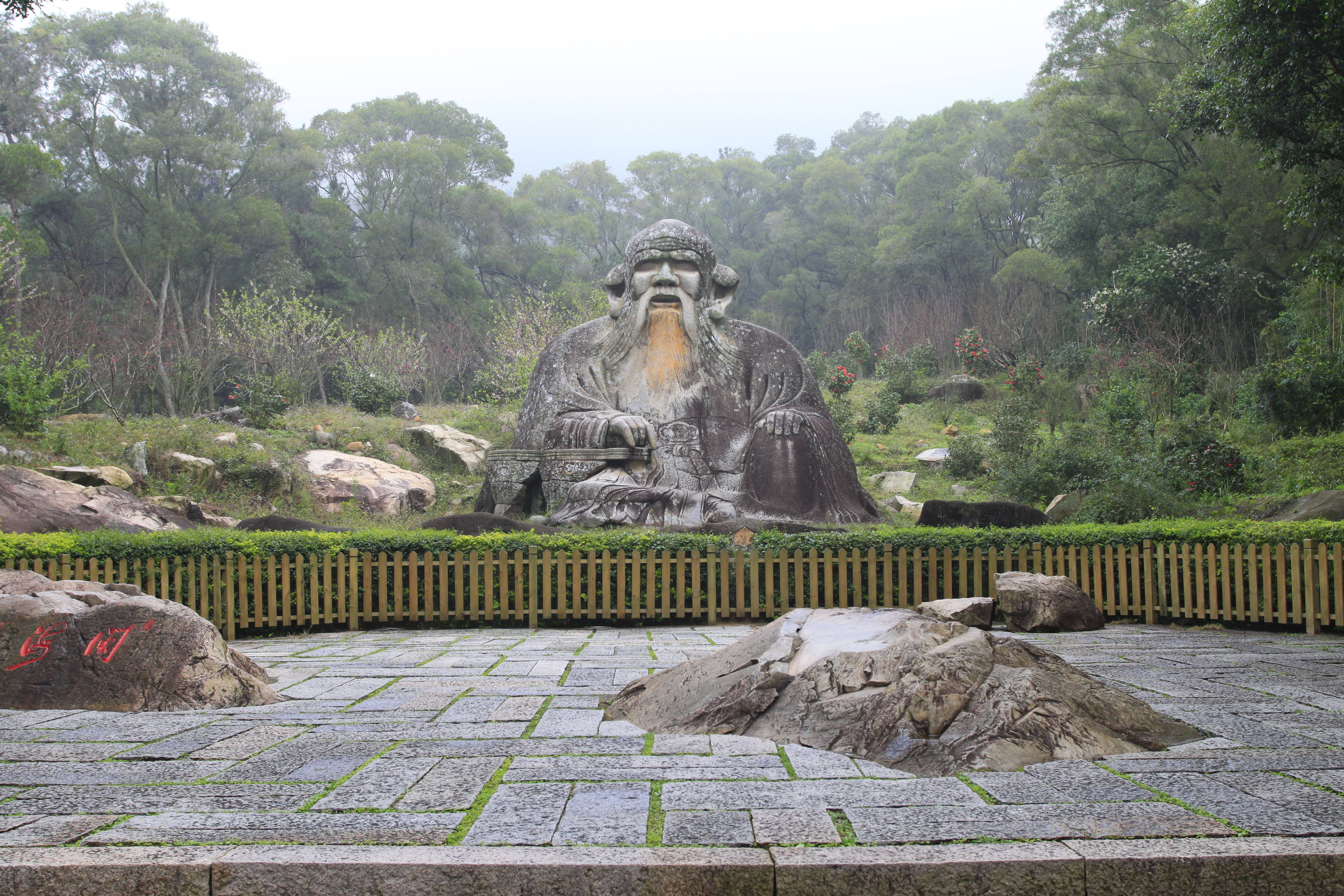 清源山老君岩造像，位于中国福建省泉州市，是全国重点文物保护单位。